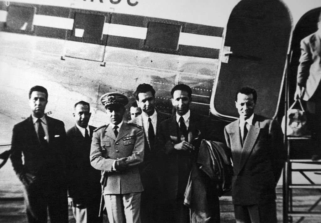 Avion des rebelles algériens avant sans décollage de Maroc et son kidnapping par l'armée française le 22-10-1956